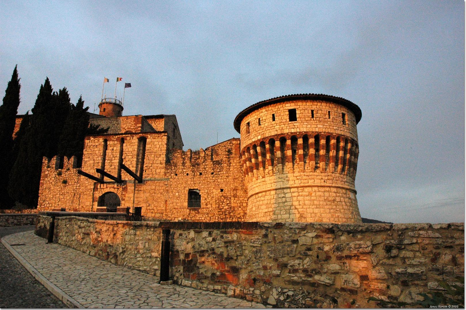 Brescia